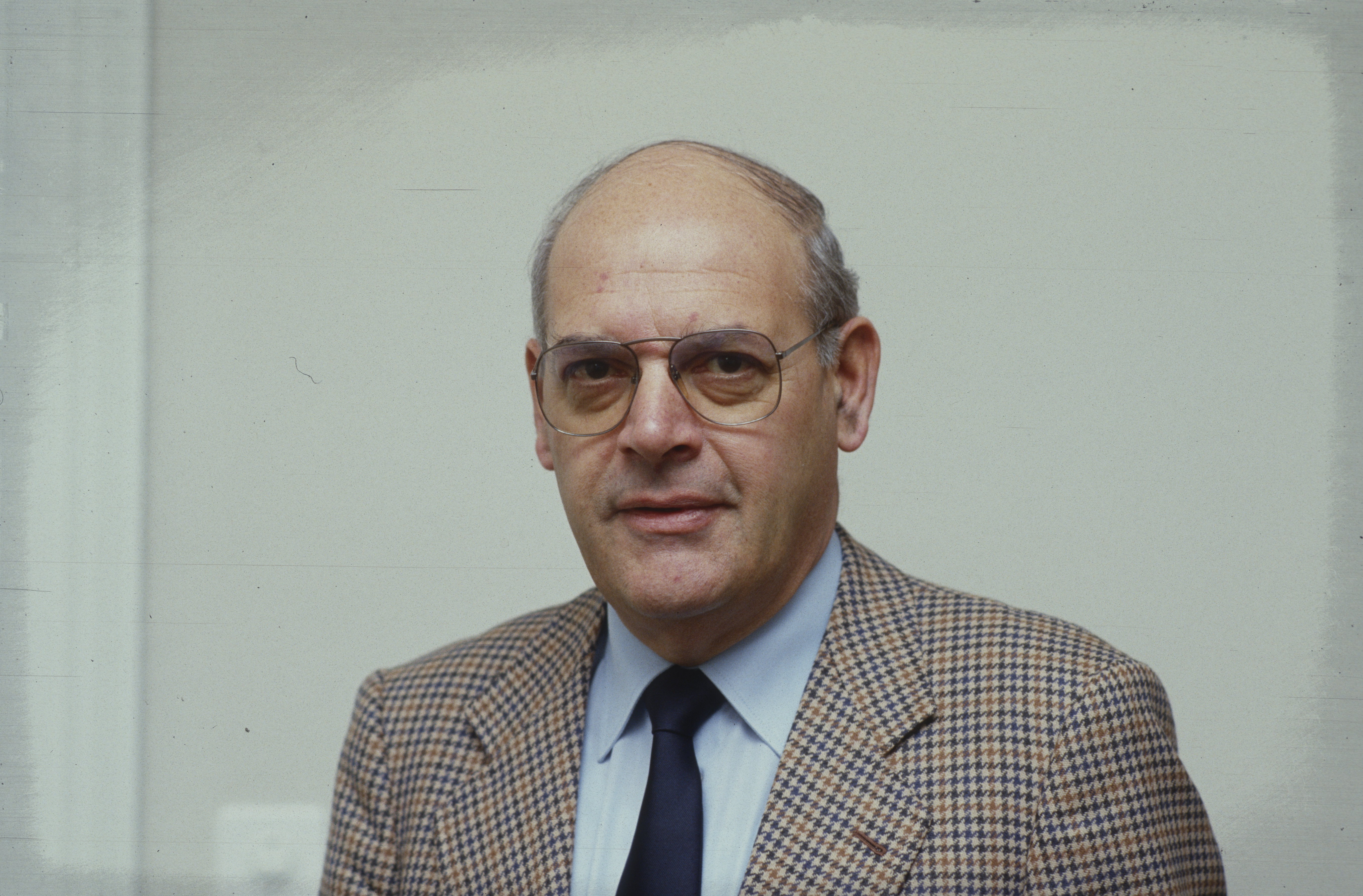 Hansruedi Schmid (1928–2012), Basler Regierungsrat (parteilos, 1976–1984)